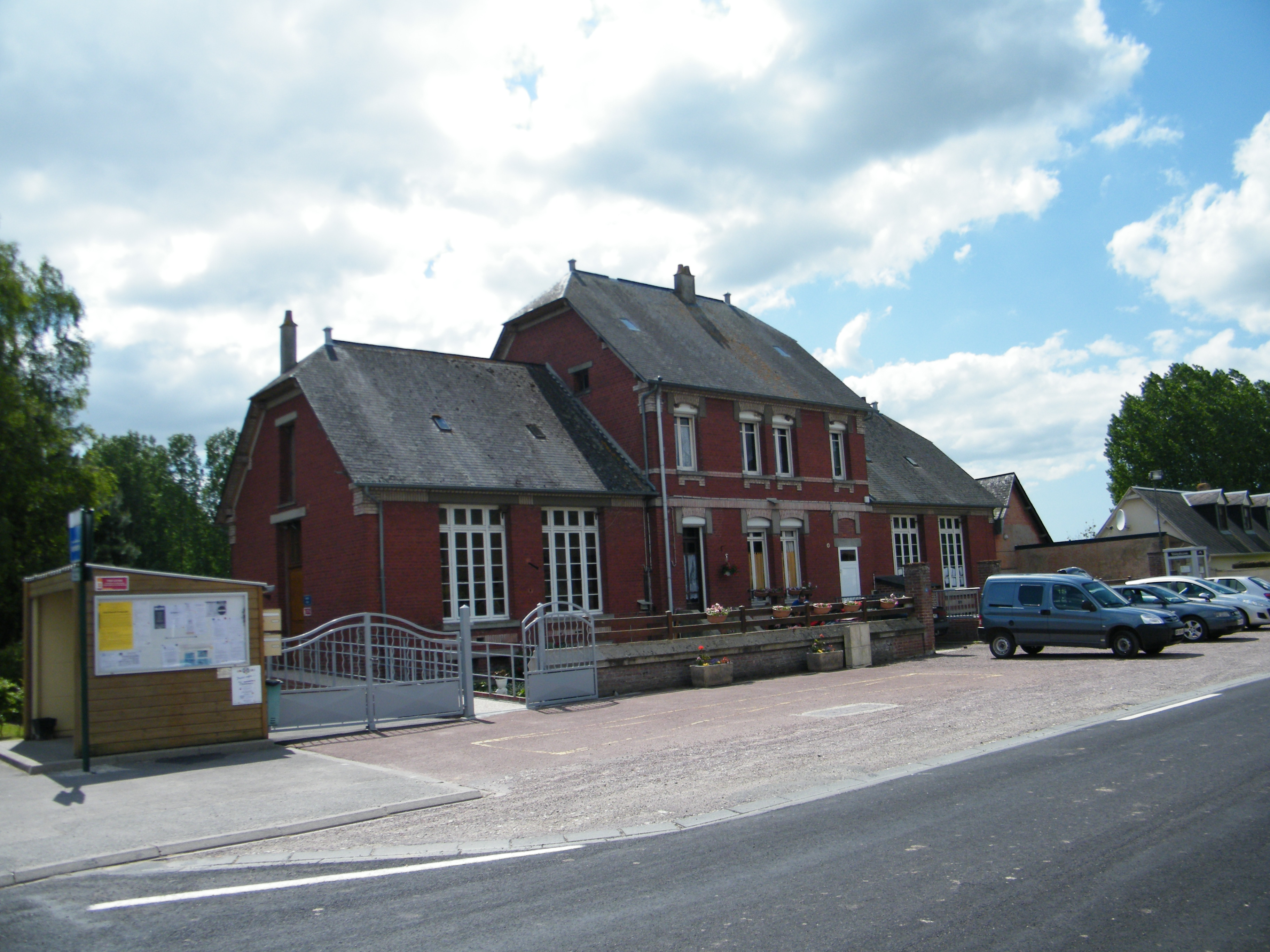 Mairie-école.